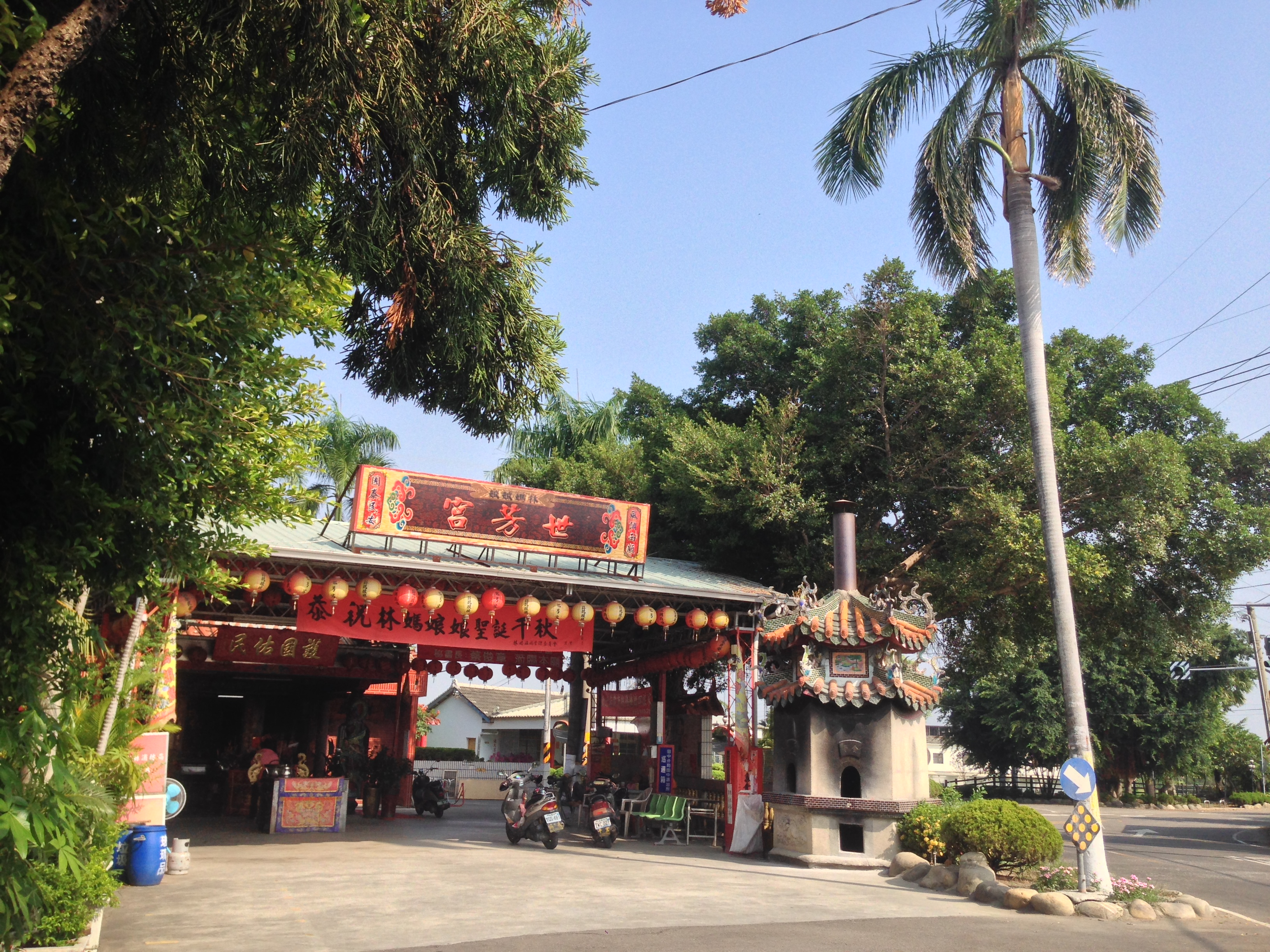 世芳宮斜照